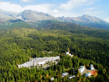 Vyšné Hágy